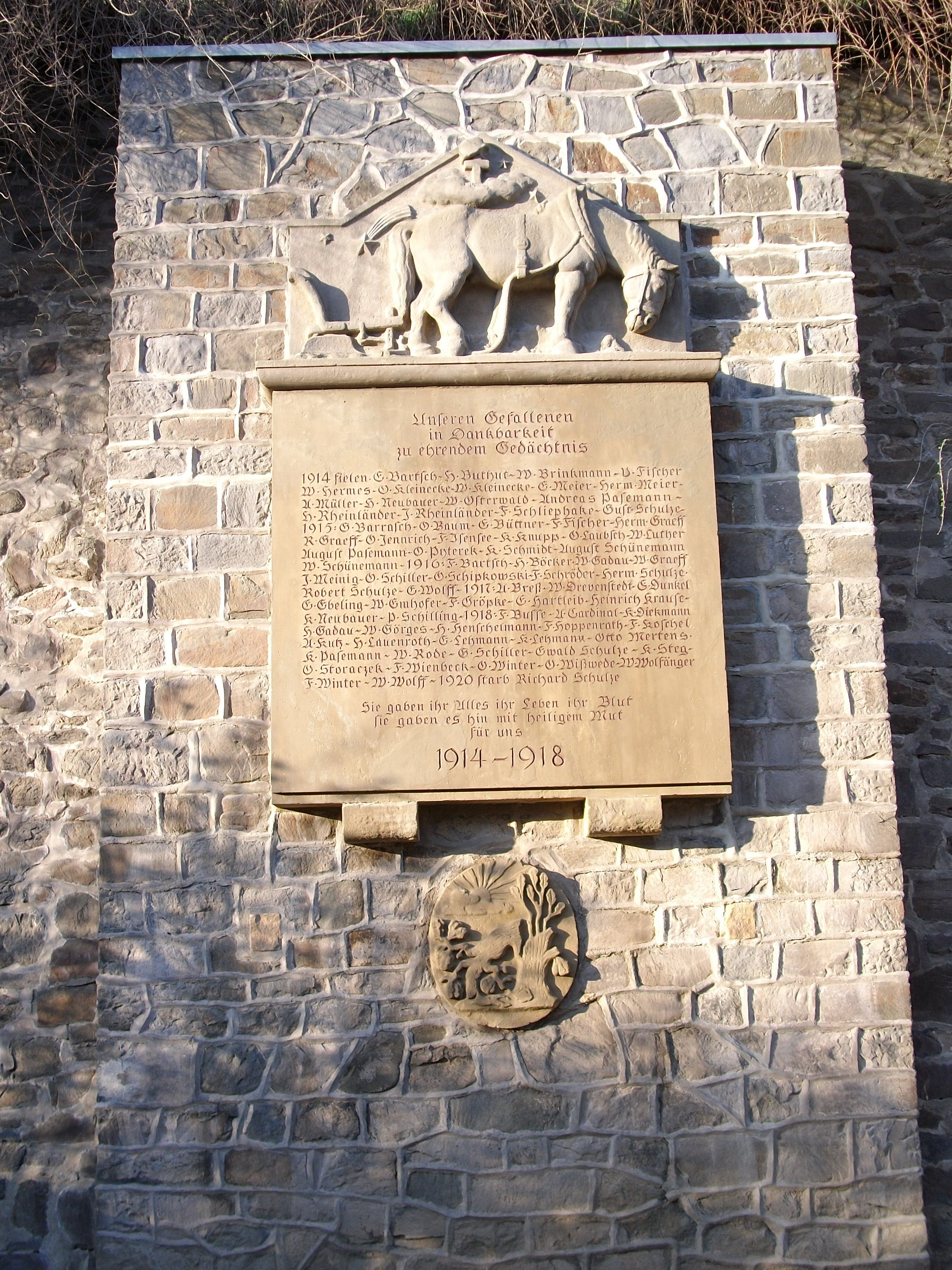 Kriegerdenkmal 1914-1918 in Hundisburg